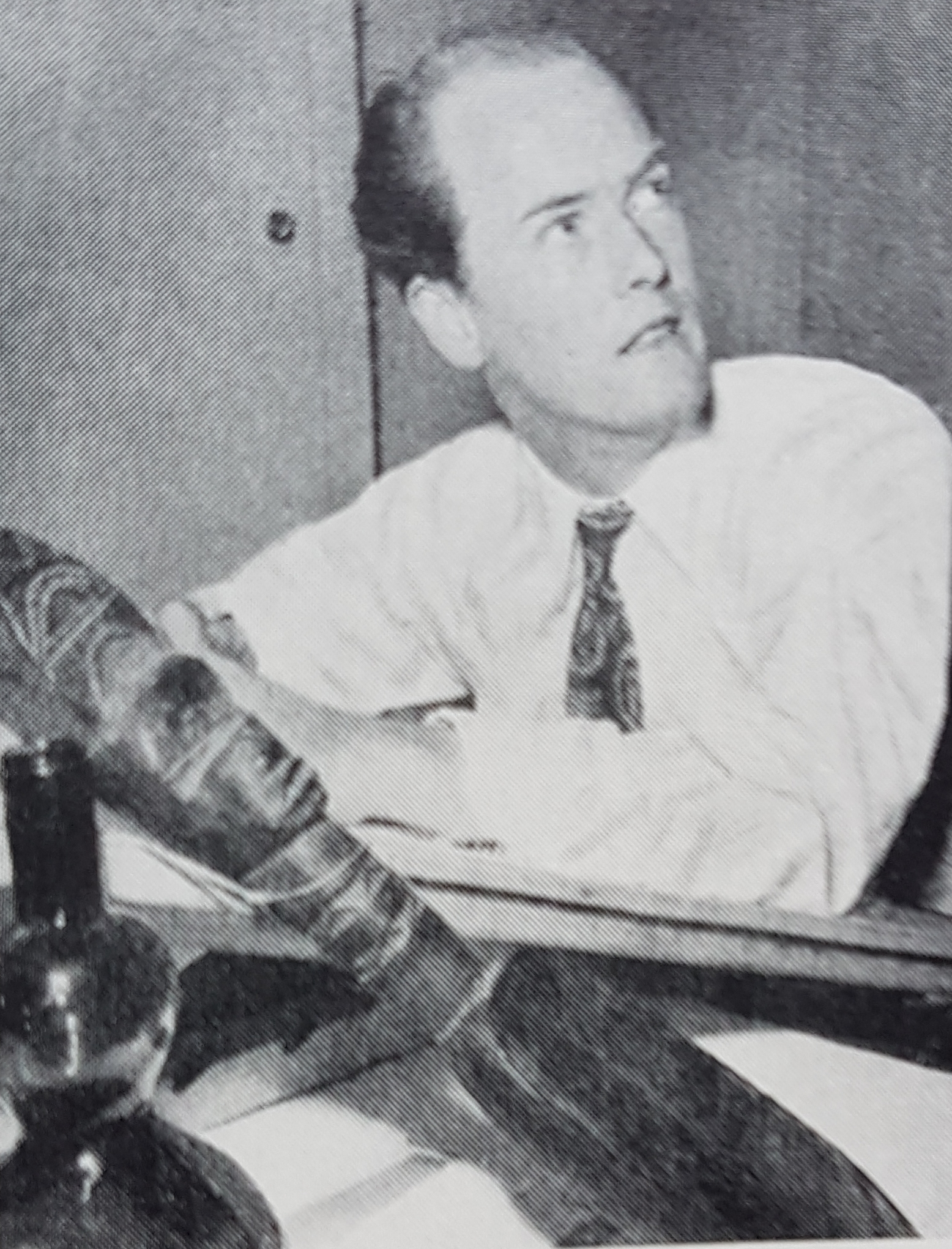 Olle Eksell, avfotograferad porträttbild från Allhems Svenskt konstnärslexikon.